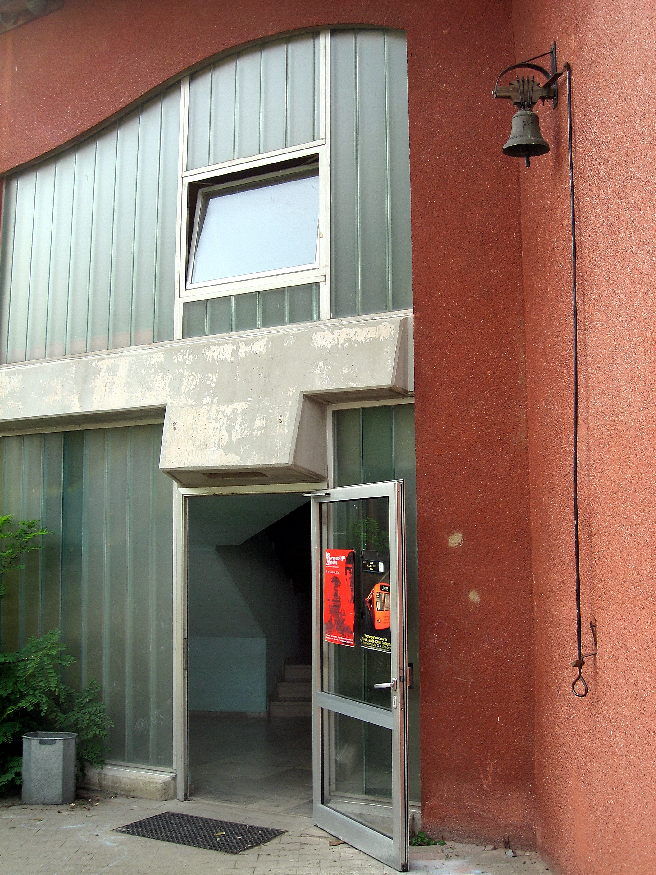 Dortmund, Brünninghausen, Anthroposophen, Architektur, Schulglocke